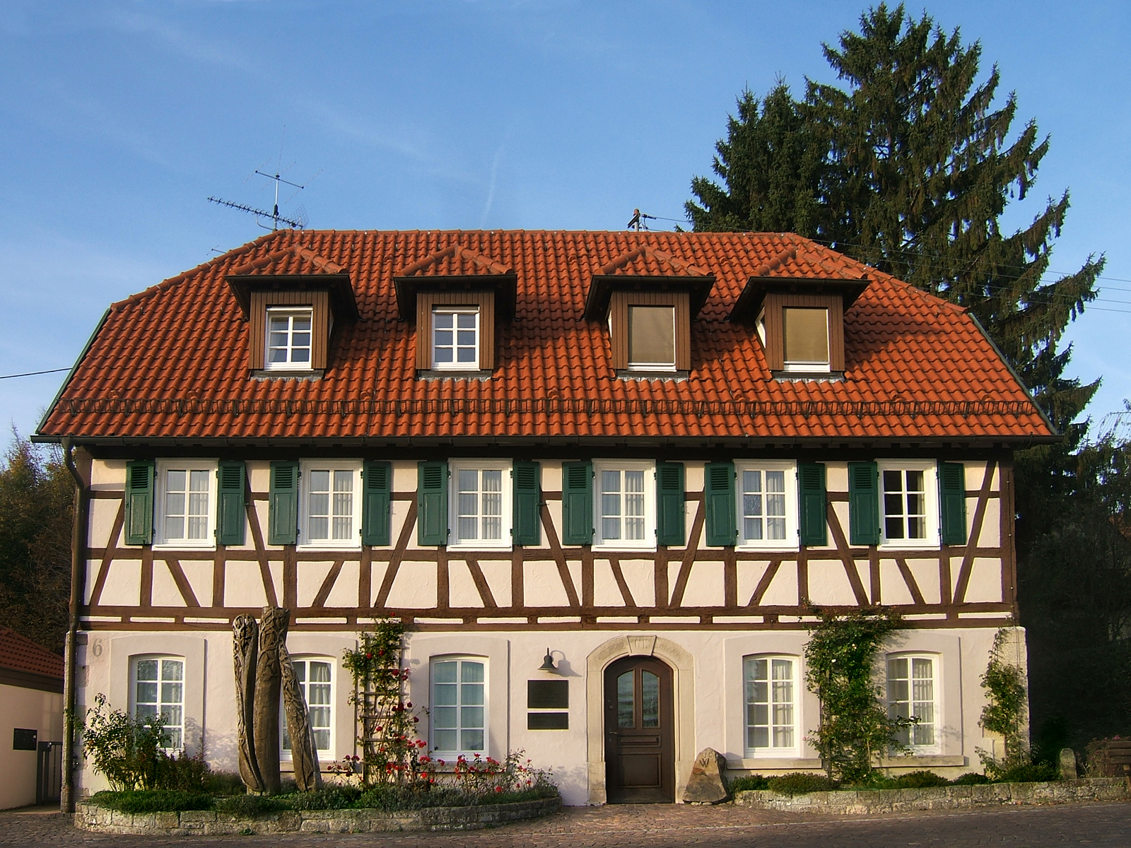 Remshalden-Buoch, Deutschland; Museum im ehemaligen Gasthof Hirsch; davor die Skulptur "Wald"